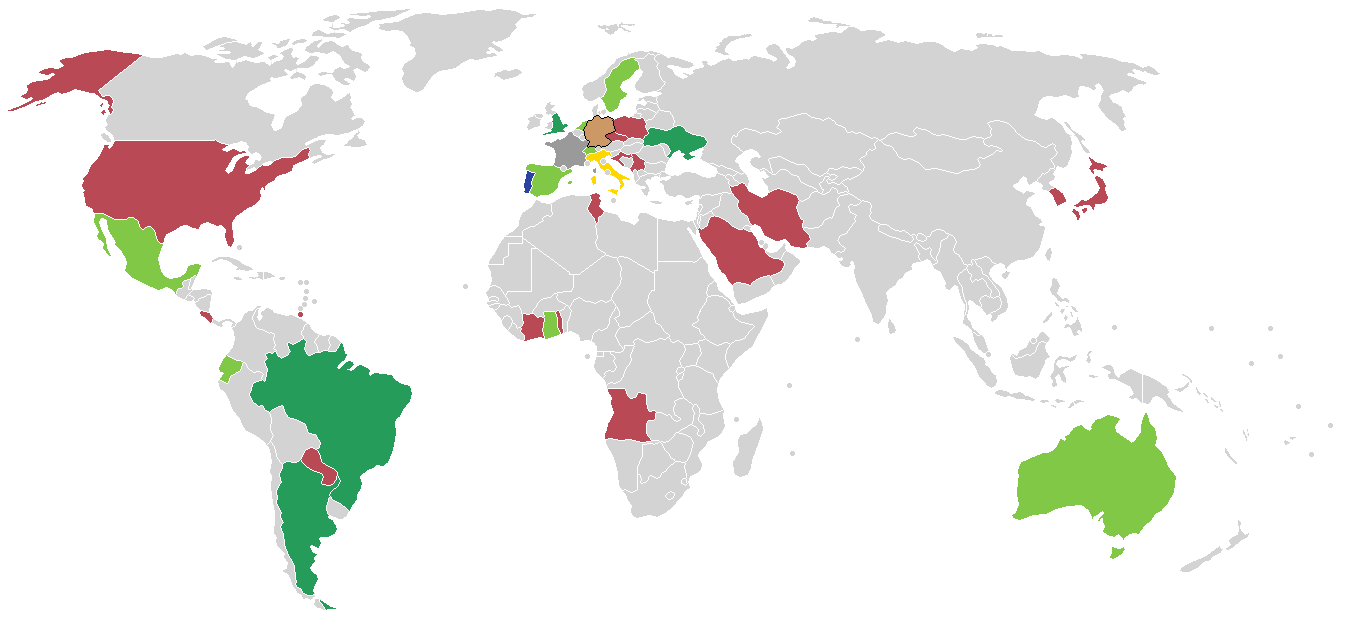 légende enlevée de l'image, contour en noir du pays organisateur